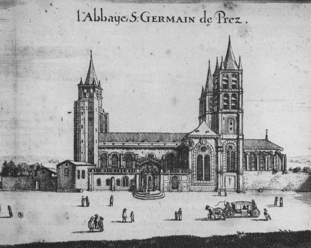 Israël Silvestre (1621-1691): L'Abbaye, S:Germain de Prez, gravureEglise de St Germain des Prés, Paris, France.